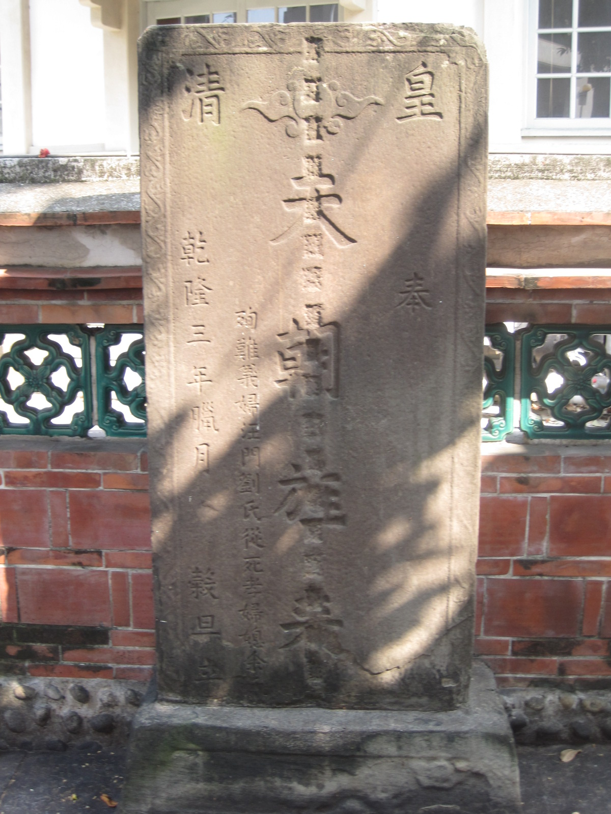 中文（台灣）: 彰化節孝祠內陳列的天朝旌表碑。